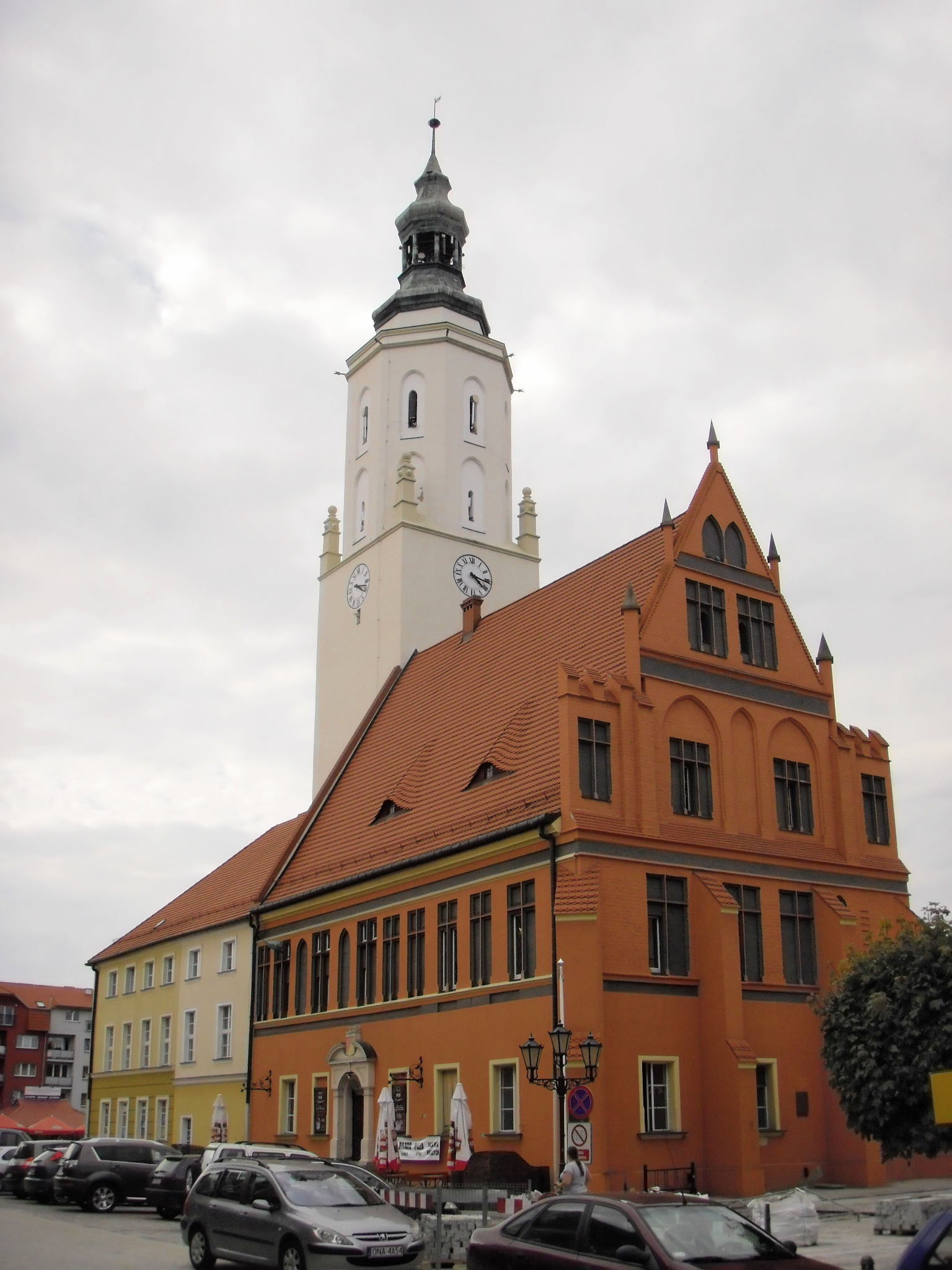 Namysłów, ratusz, 1374-1378, XV, XIX